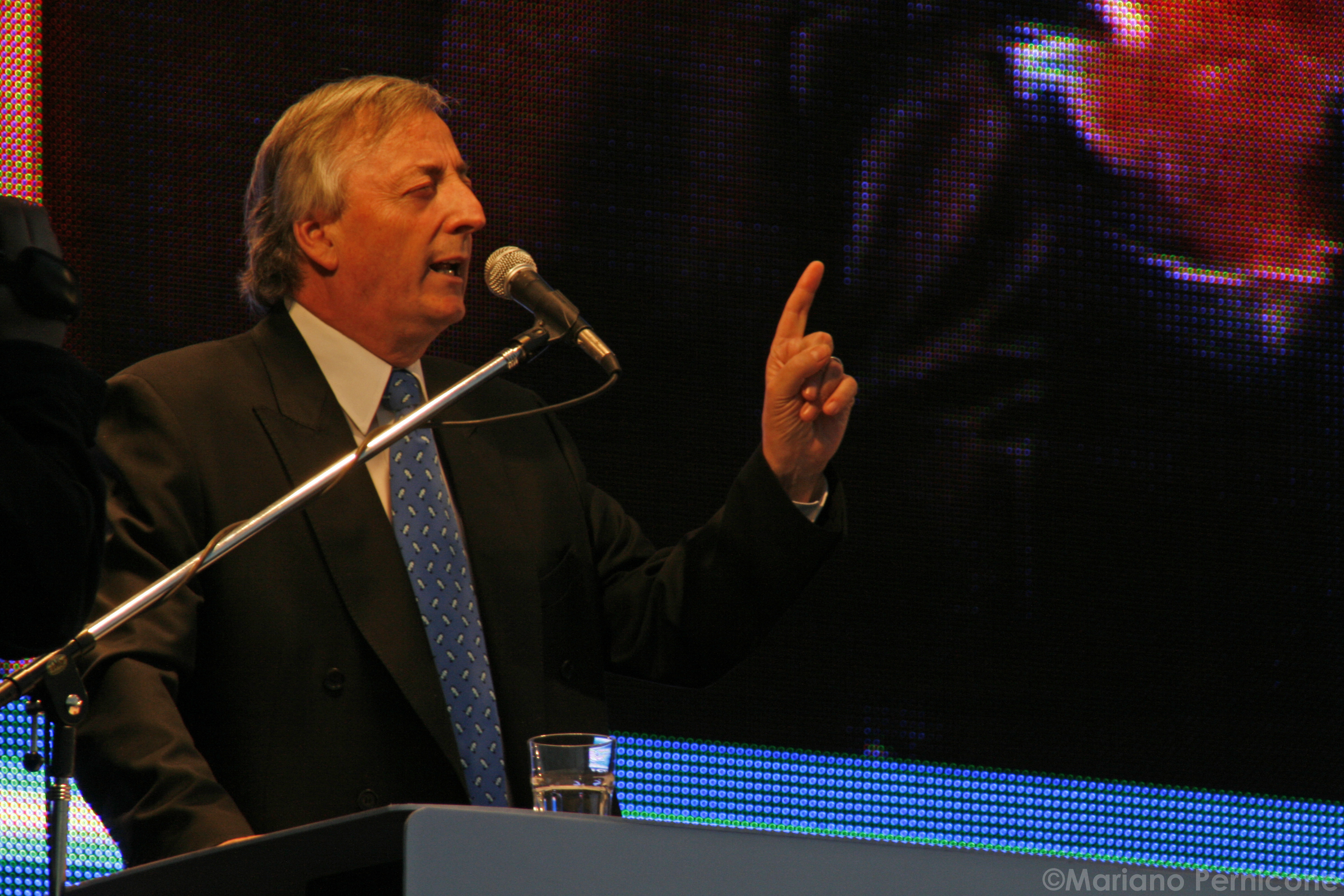 Cierre de Campaña en el Mercado Central de Buenos Aires - La Matanza